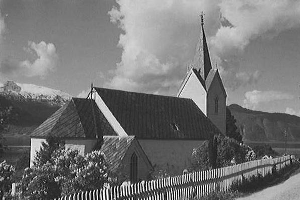 Leikanger kyrkje i Leikanger i Sogn. Tårnet er sidan rive og eit nytt er bygd i staden. Det er i myrkt treverk.